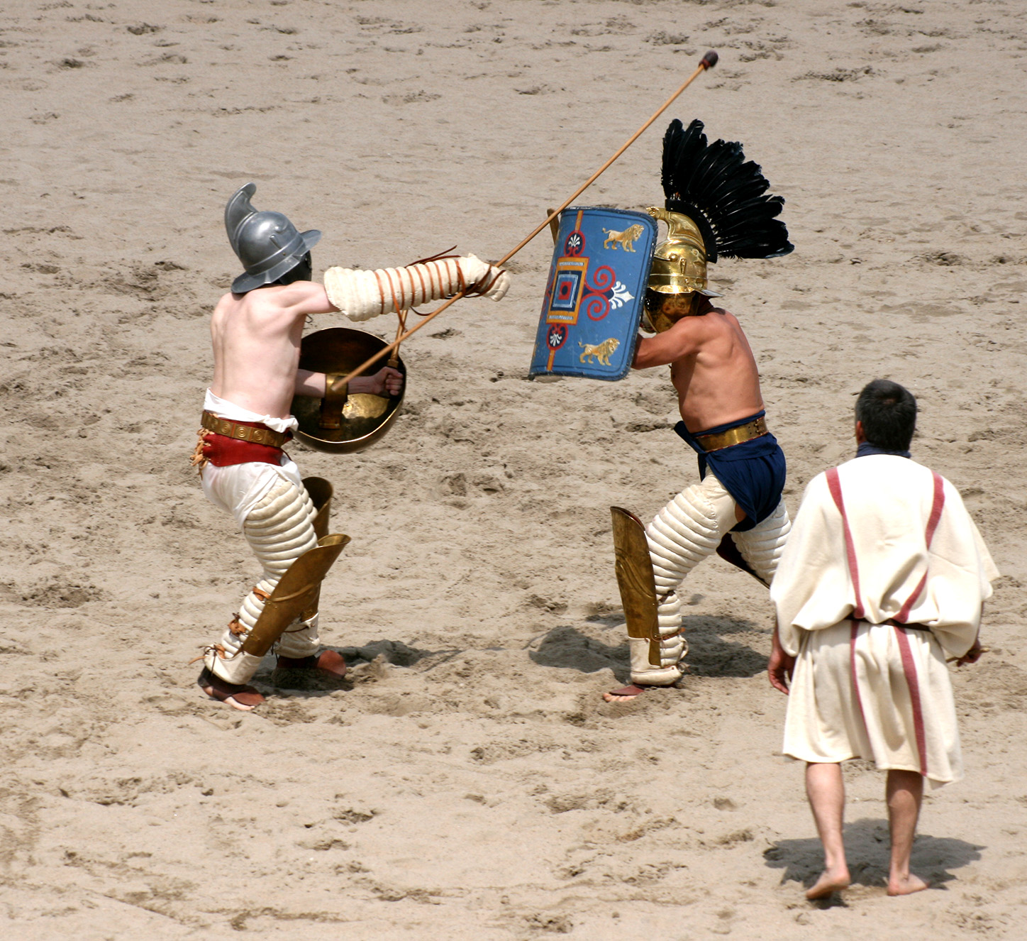 Hopplomachus (links) gegen Thraex. Römertage 2012 in Xanten.